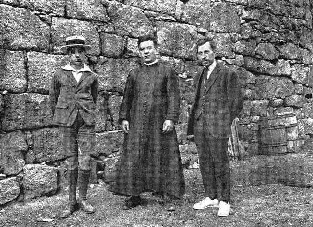 Cesáreo García Álvarez e José Gómez López en Carballeda, fotografía en Vida Gallega 1924